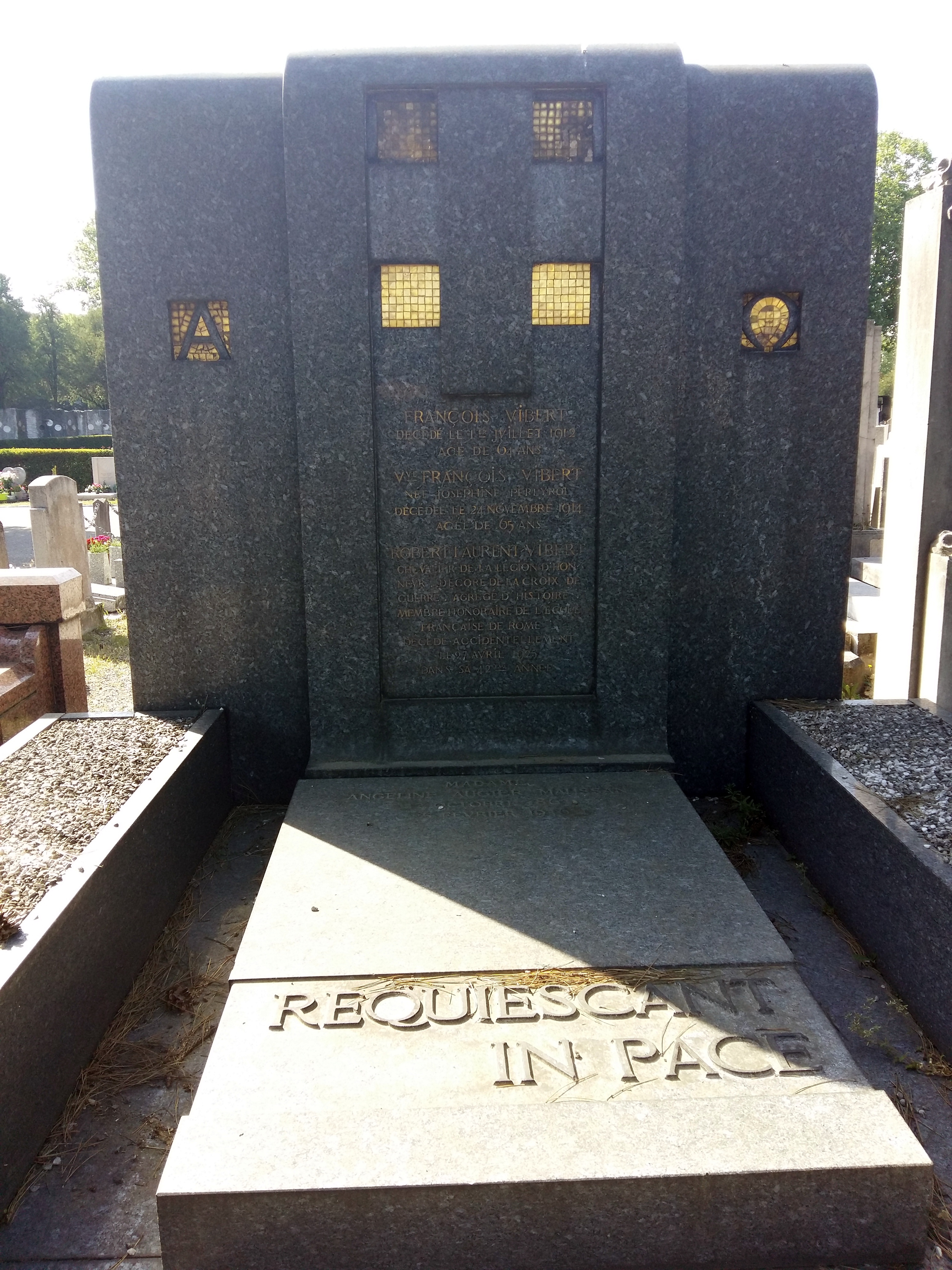 Tombe de Robert Laurent-Vibert au cimetière de Guillotière (Lyon)